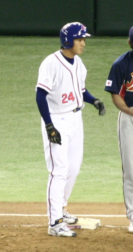 林威助